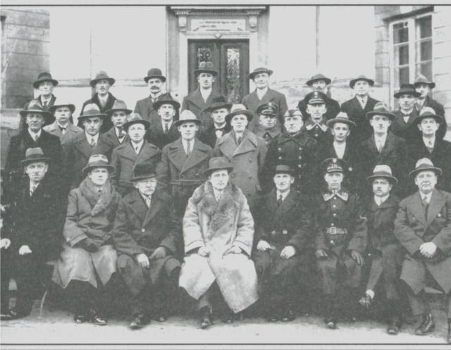 Polska, woj. wielkopolskie, powiat pleszewski, gmina Dobrzyca, Hrabia Stefan Czarnecki i jego goście.